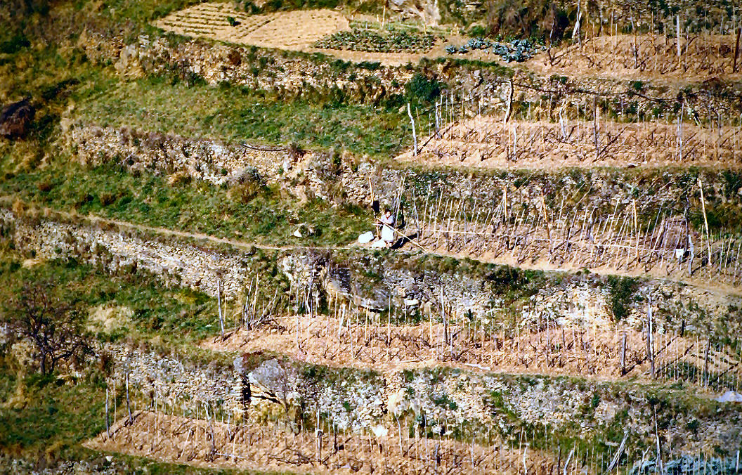 Lavora nella vigna delle Cinque Terre in Italia.